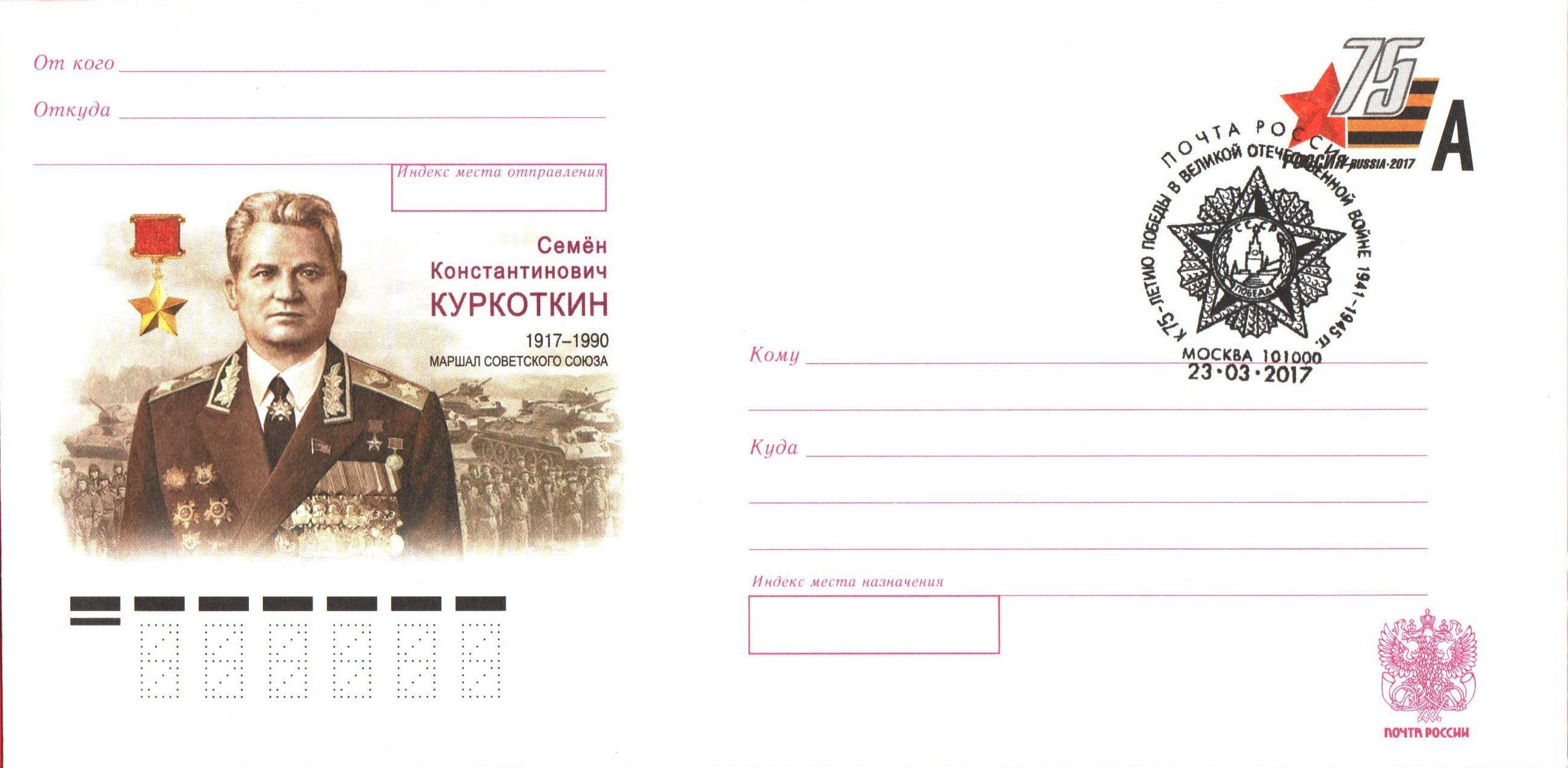 Куркоткин Семён Константинович, почтовый конверт РОССИЯ